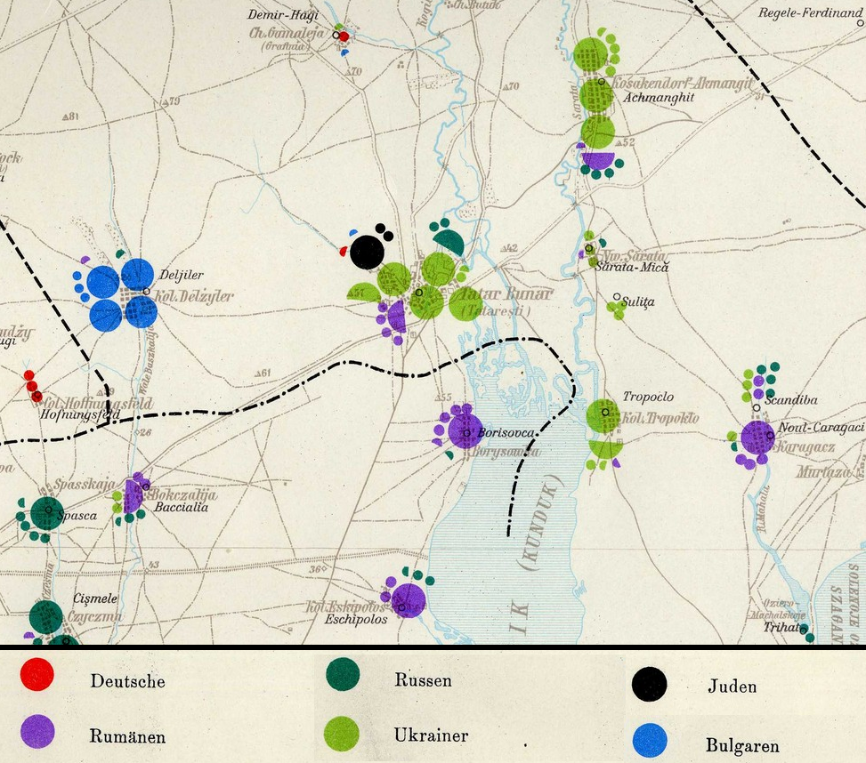 Етнічний склад Татарбунар і околиць. 1930 р.